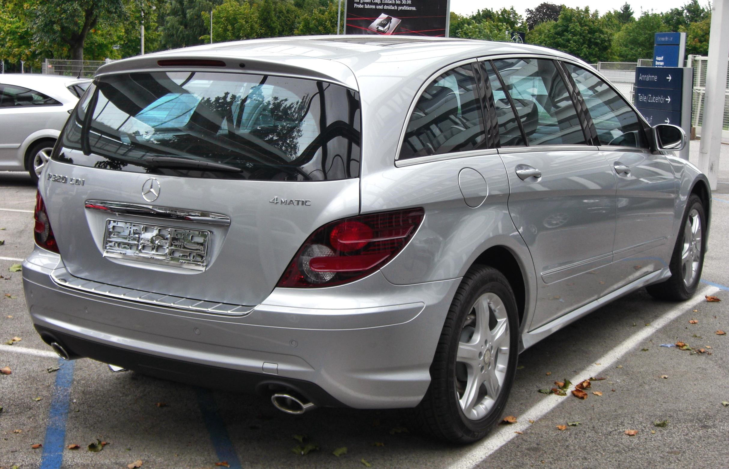 Mercedes R-Klasse Facelift